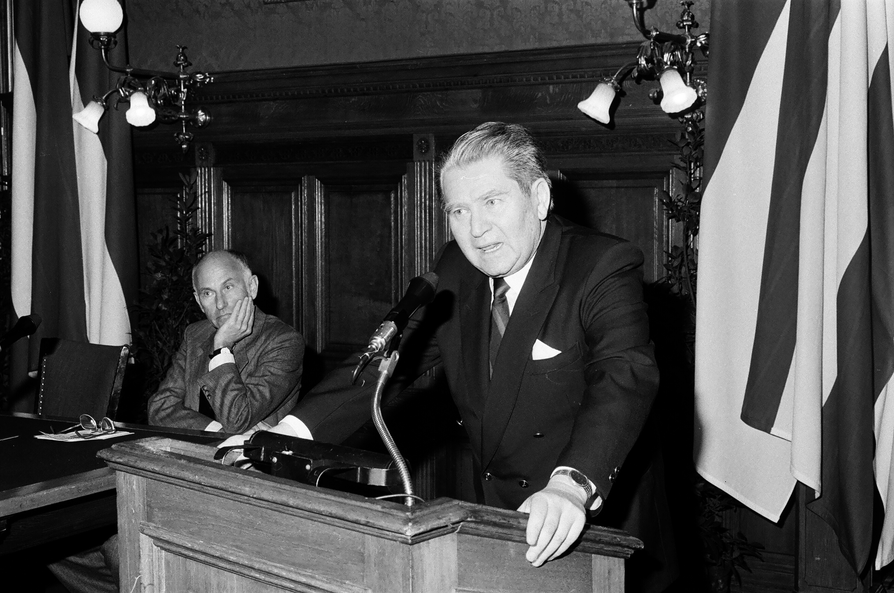 Andreas Rett als Vortragender der Wiener Vorlesungen am 16. Dezember 1987. Franz Kreuzer, ehem. Bundesminister für Gesundheit und Umweltschutz, Moderation, im Hintergrund.